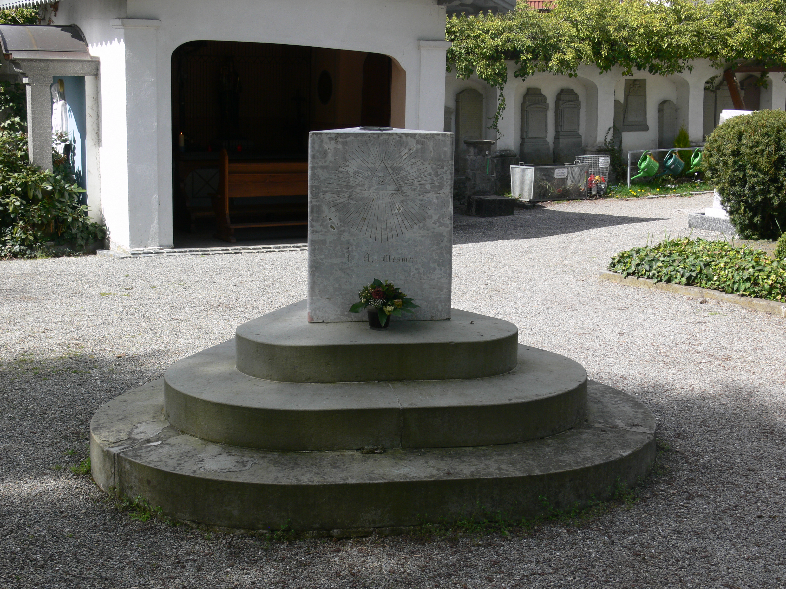 Friedhof in Meersburg (Bodenseekreis) Grabstätte Franz Anton Mesmer